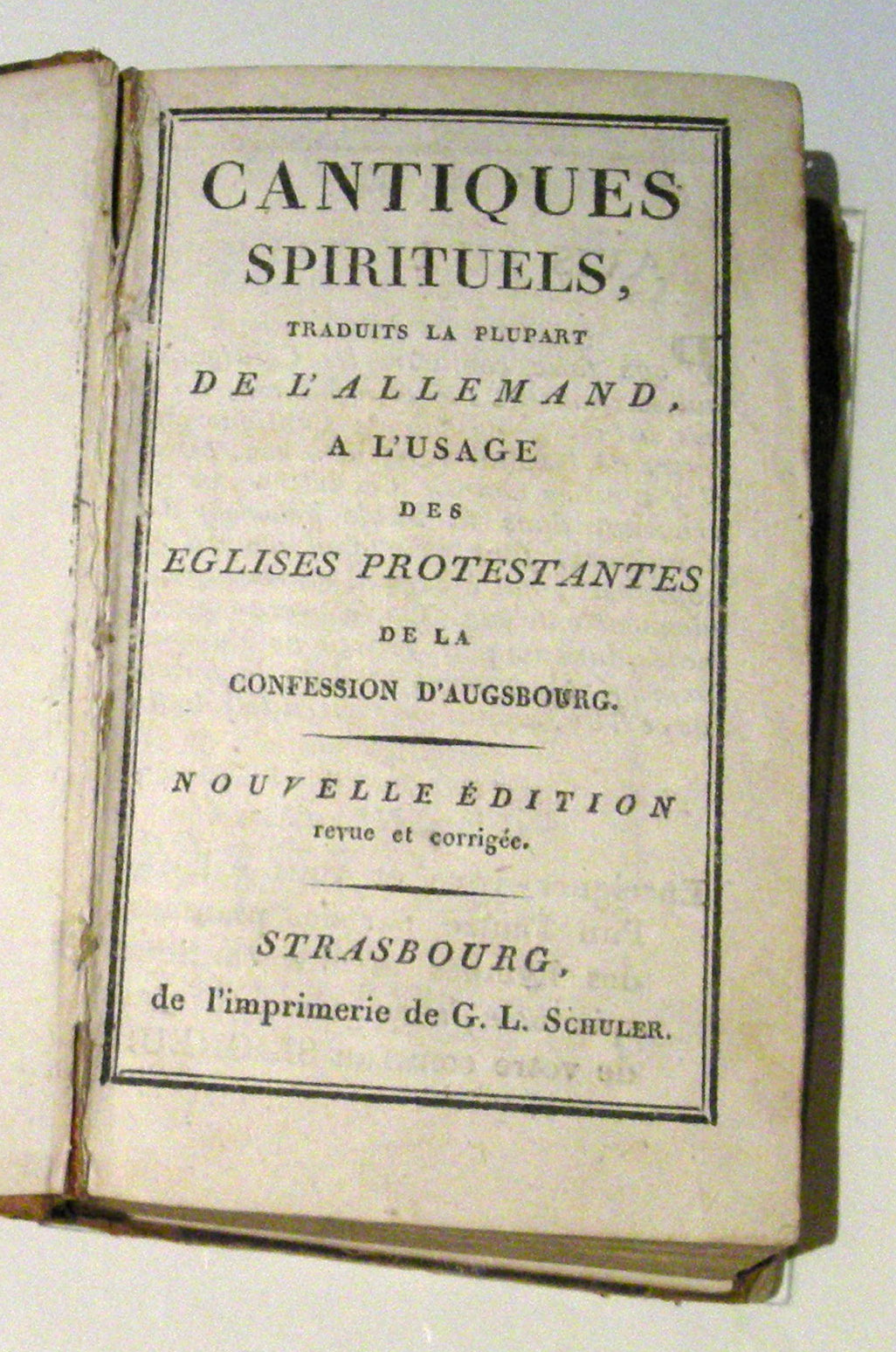 Cantiques spirituels, souvent traduits de l'allemand, et attribués au pasteur Jean-Georges Stuber (fin du 18e s.)